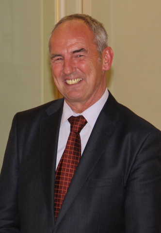 Wolf-Erich-Kellner-Preis Verleihung 2016. Franziska Meifort, Laudator Prof. Joachim Scholtyseck